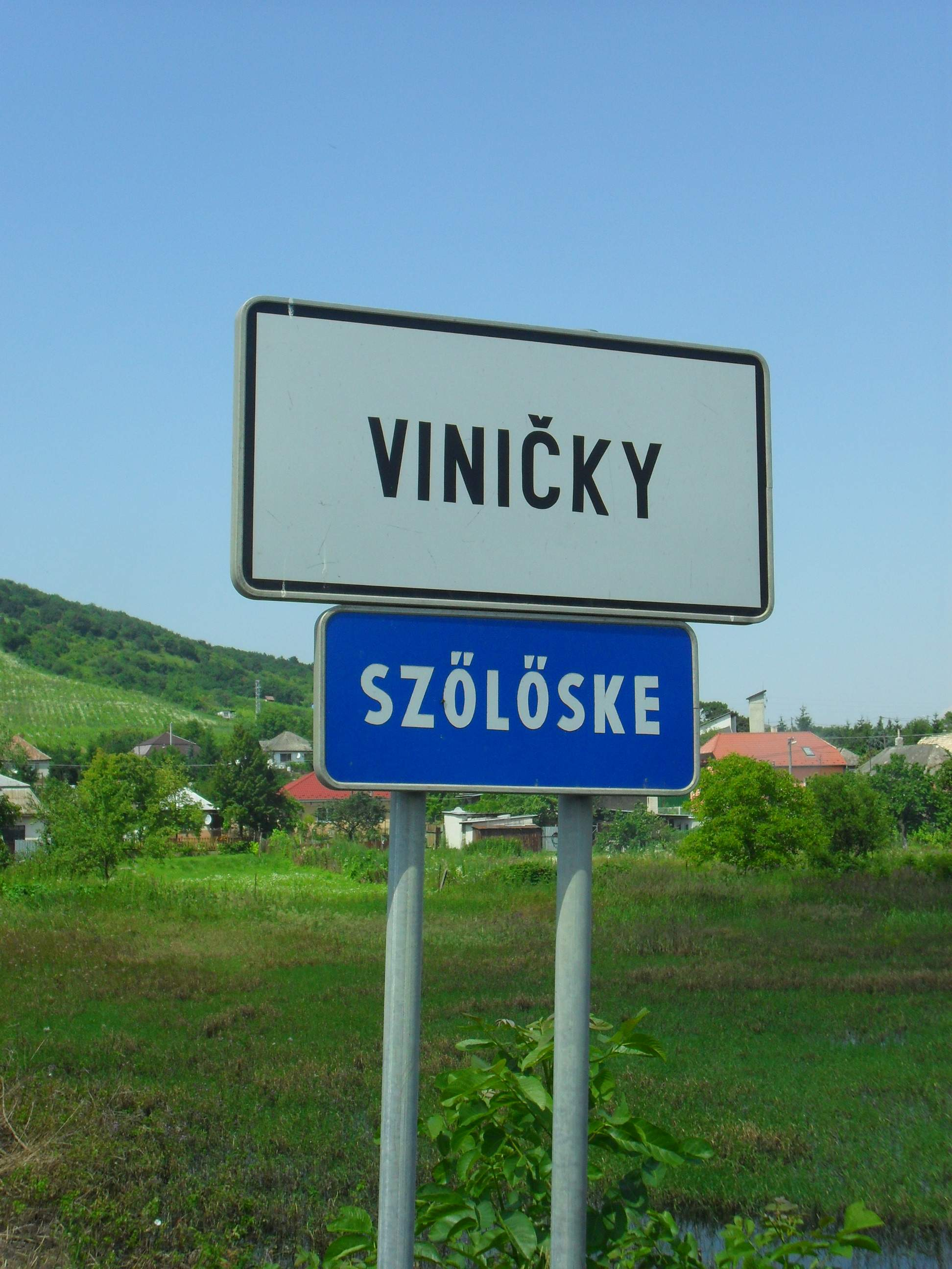 Szőlőske - kétnyelvű helységnévtábla